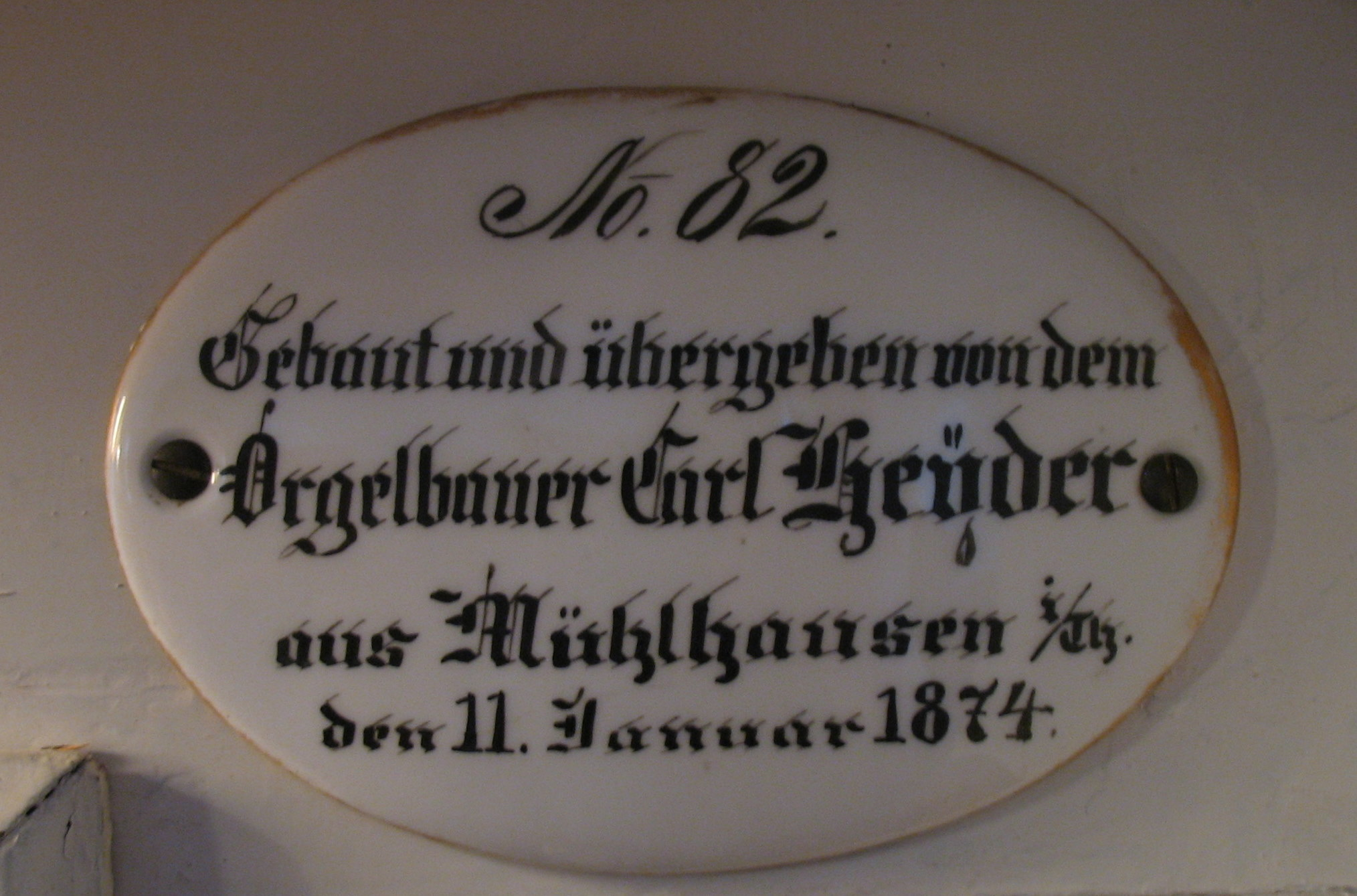 Firmenschild Carl Heyder, 1874